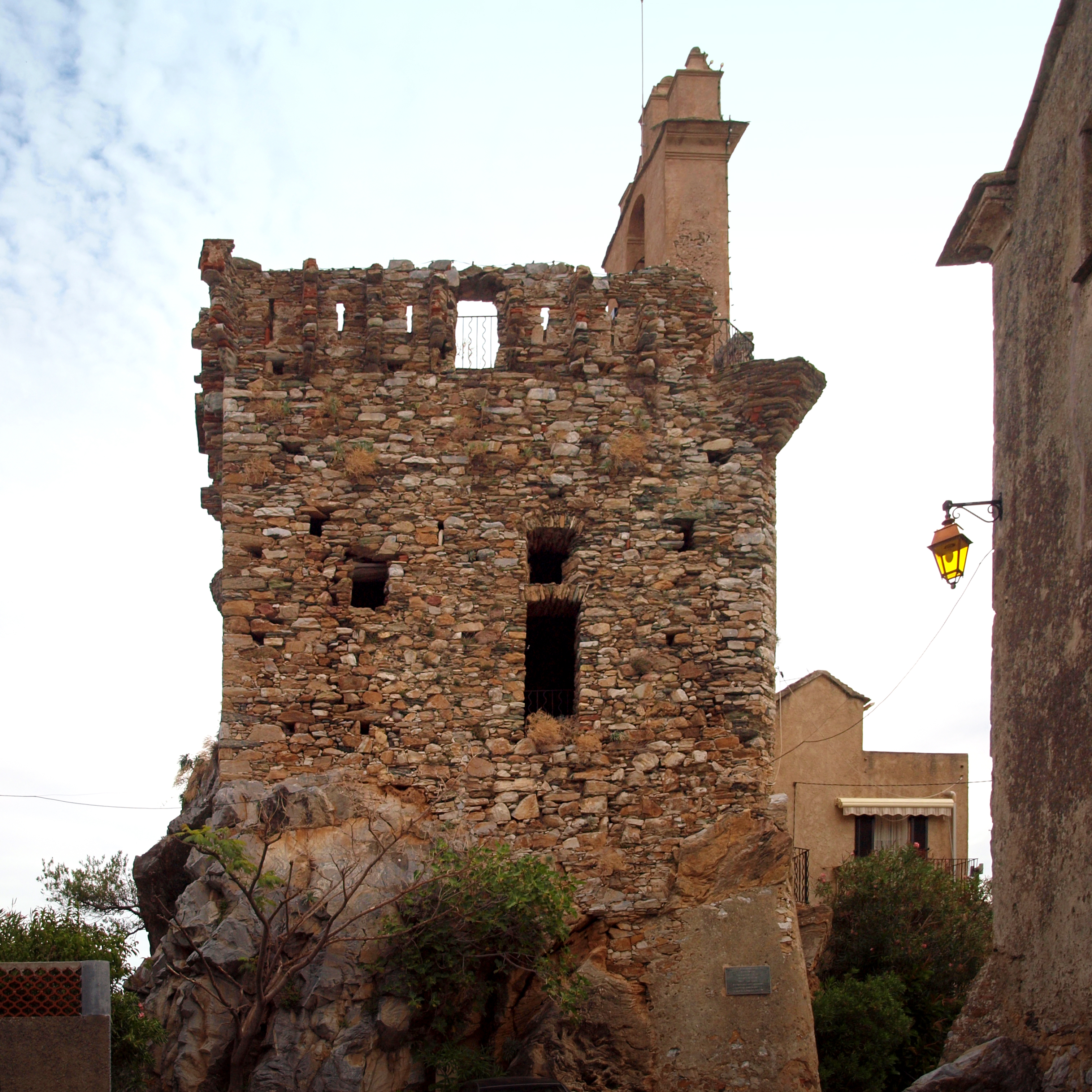 Furiani (Corse) - La tour Paoline